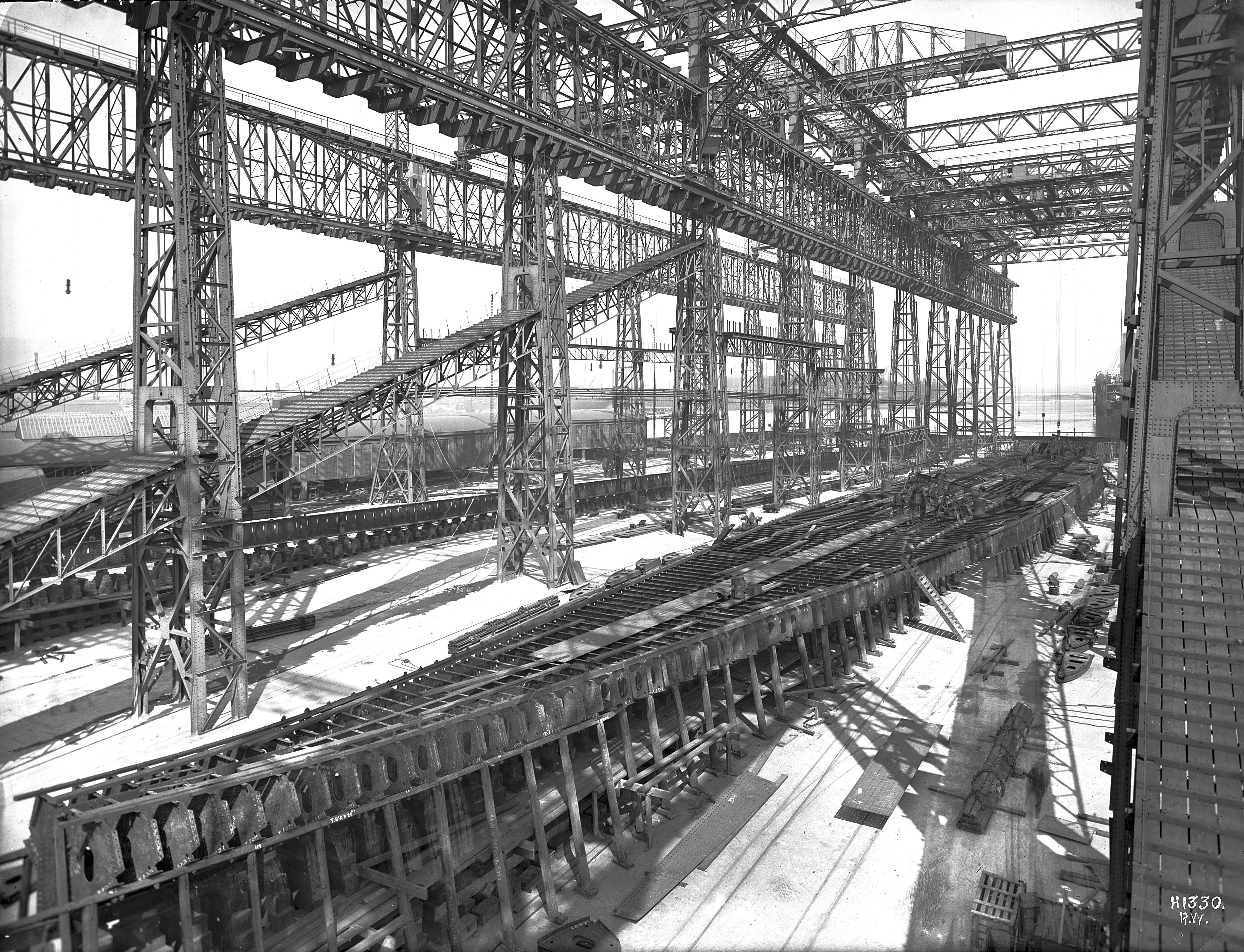 H1330 R.W.